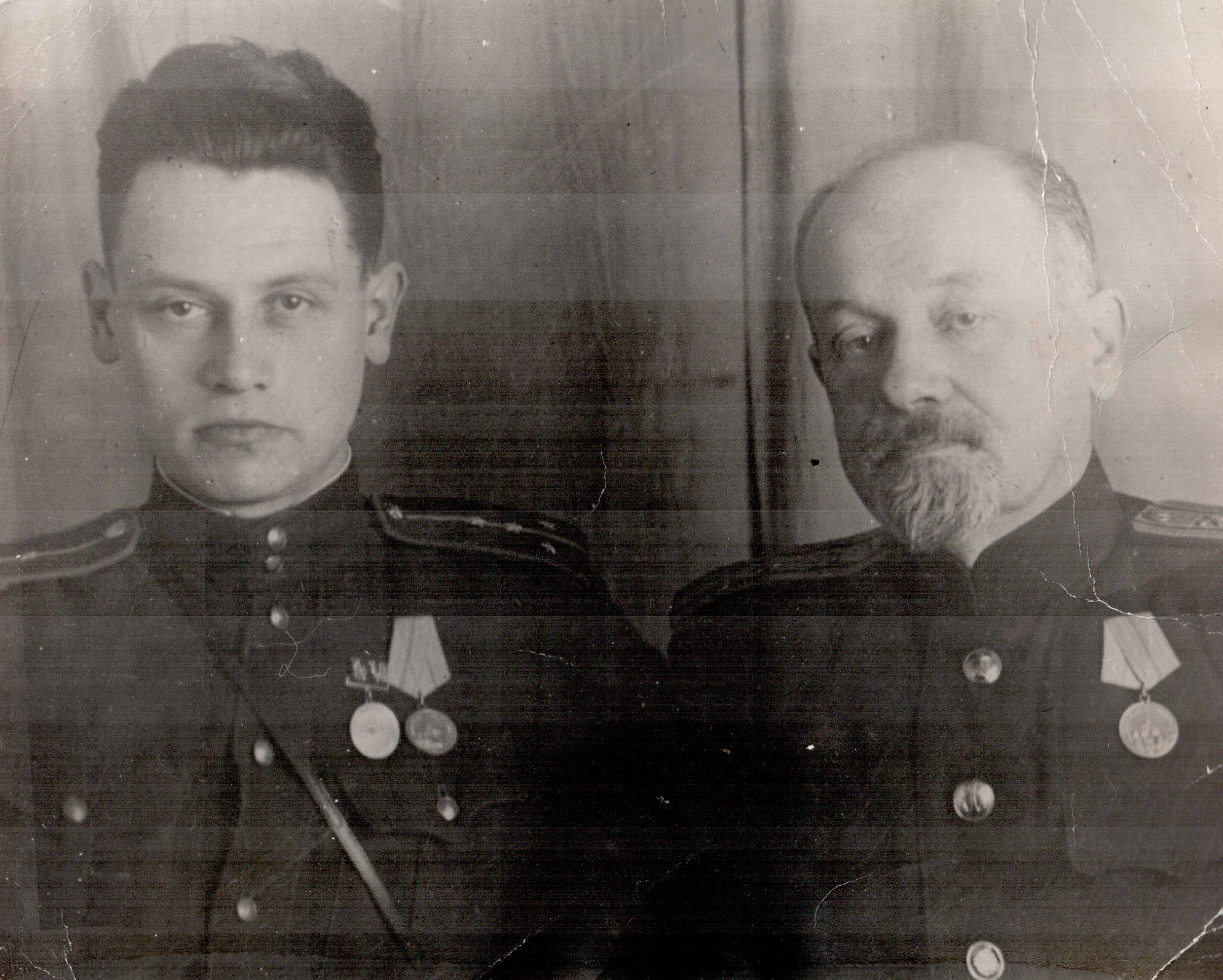 Сократ Андреевич Шустиков с сыном Сергеем